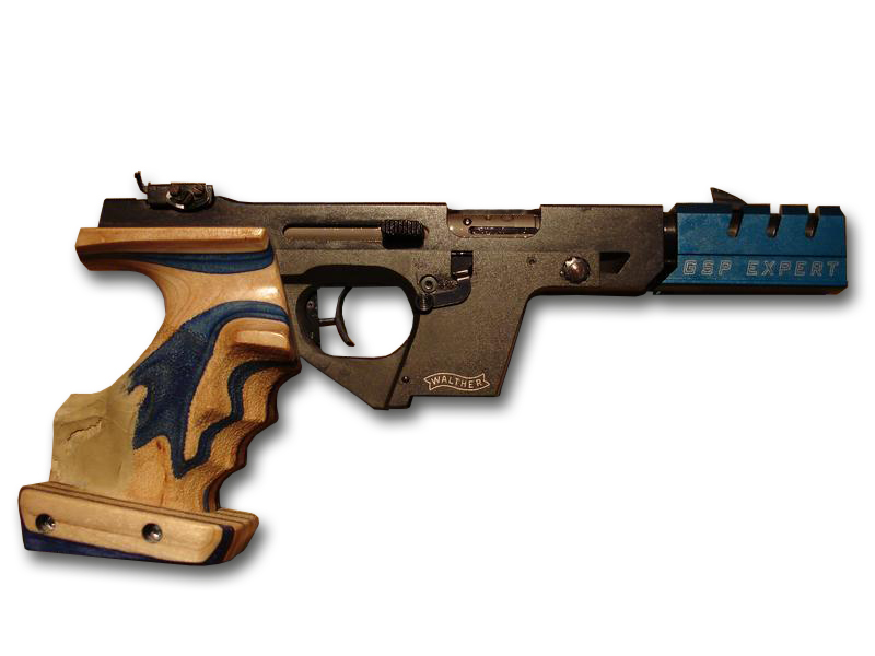 Walther GSP-Expert 22lr